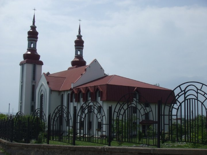 Костел Різдва Пресвятої Діви Марії, Бердянськ, вул. 12-го Грудня, 2А. Не має статусу пам'ятки